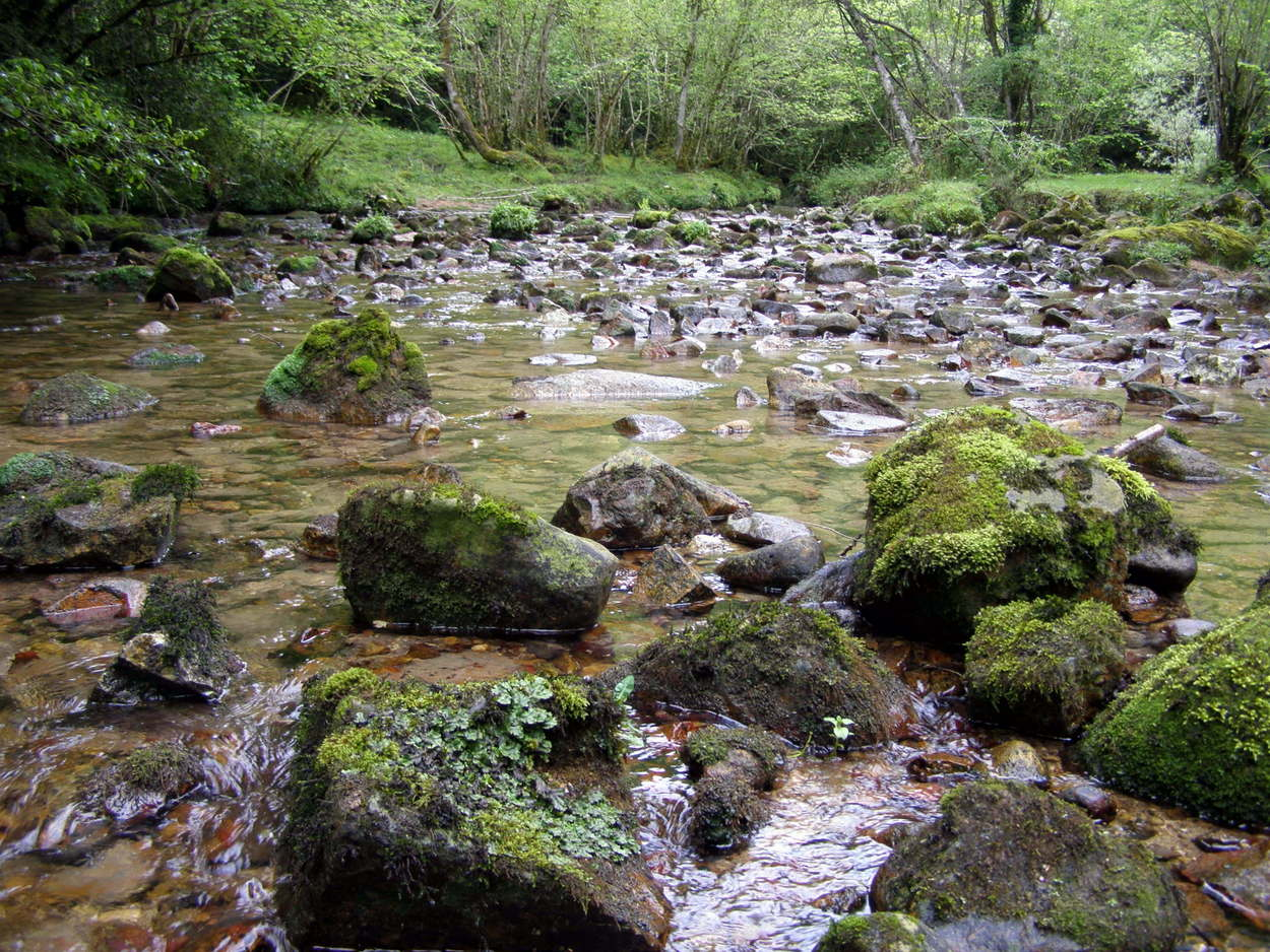 Sotobosque en el río Latarmá